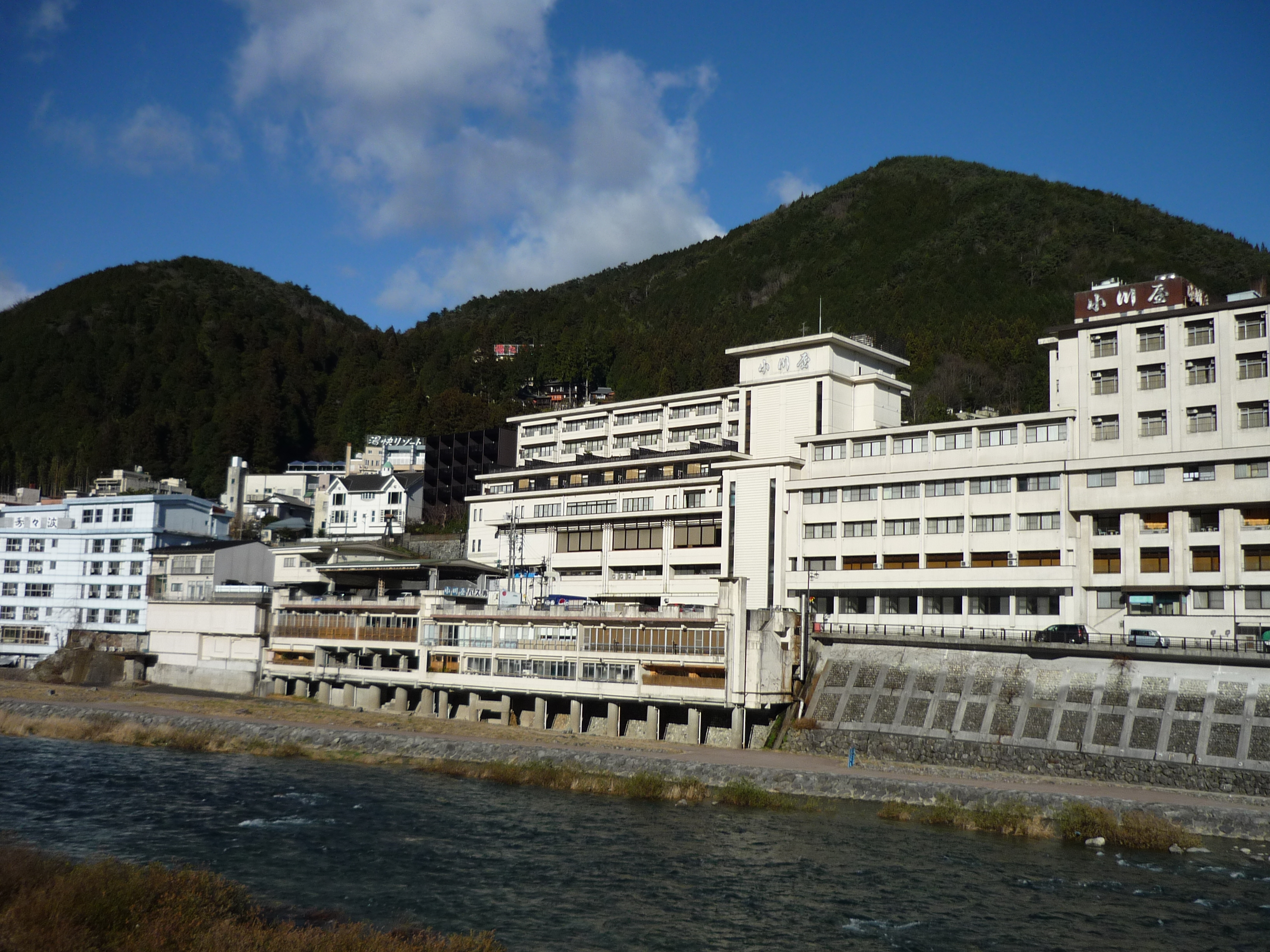 下呂温泉街（下呂大橋より、2016年12月撮影）